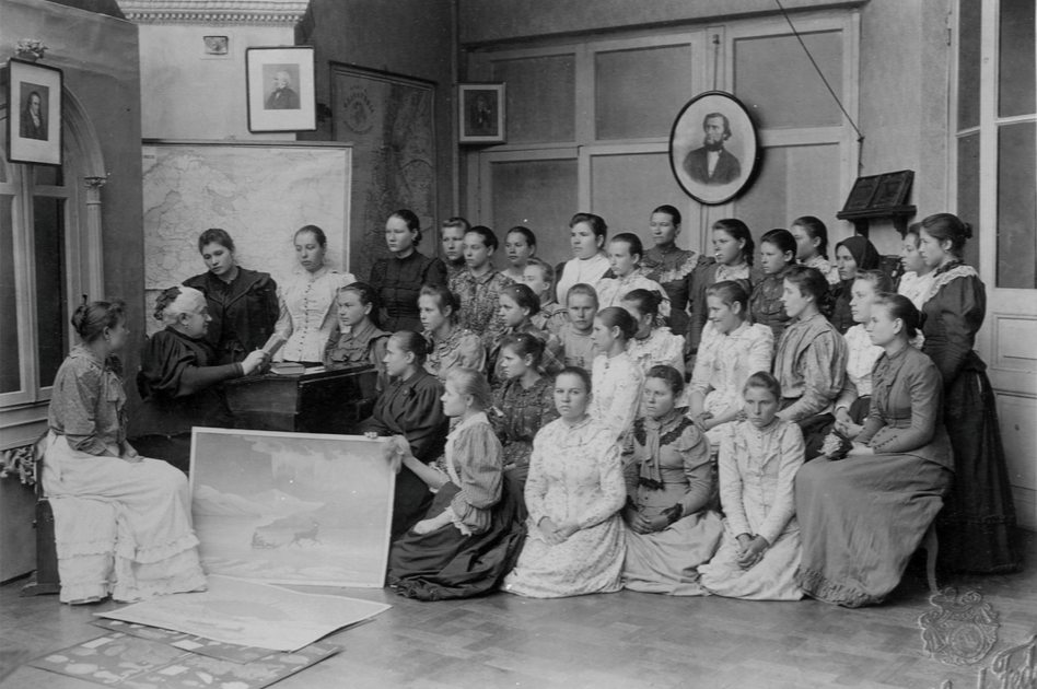 Авторська фотографія А. Федецького «Чтение Алчевской» з особового фонду Х.Д. Алчевської, який зберігається у ДАХО.